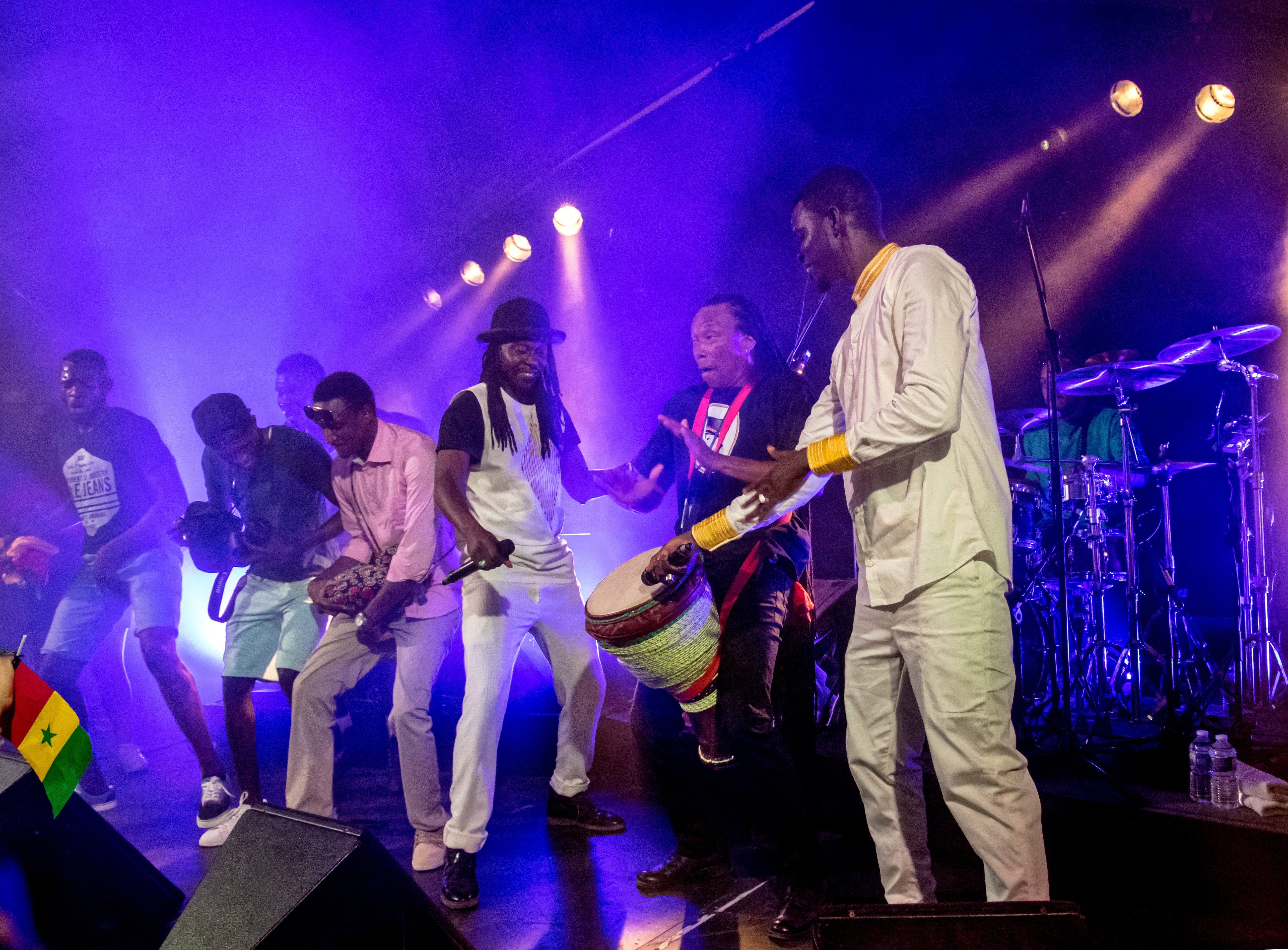 Bilder vom Zelt Musik Festival 2018 in Freiburg im Breisgau Daara J am 29.07.2018 im Spiegelzelt